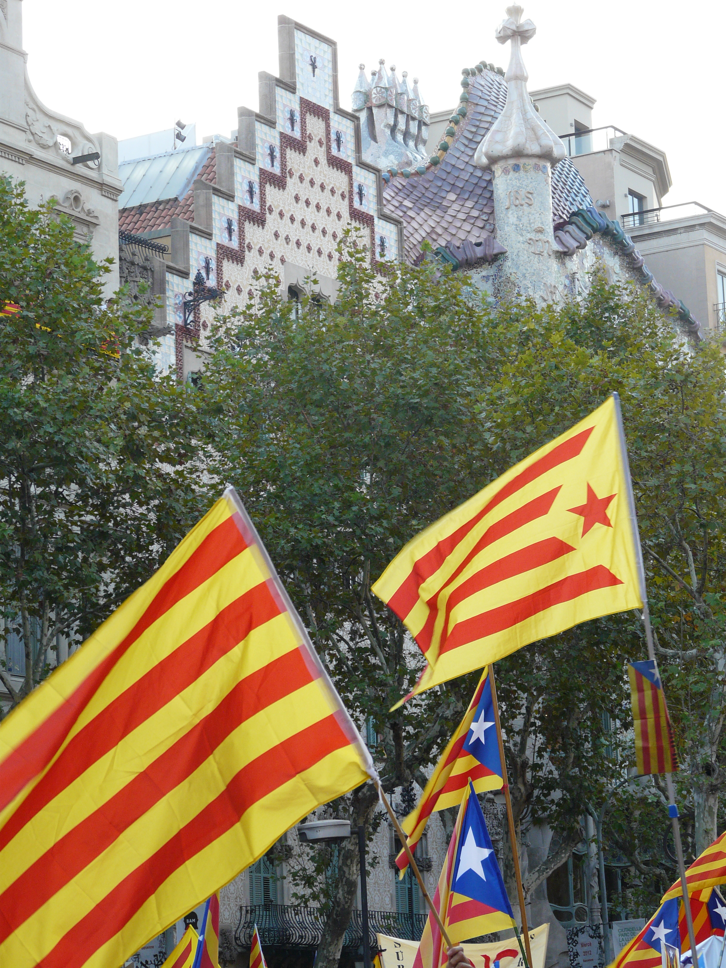 Casa Amatller (Barcelona) Object location41° 23′ 29.68″ N, 2° 09′ 54.22″ E